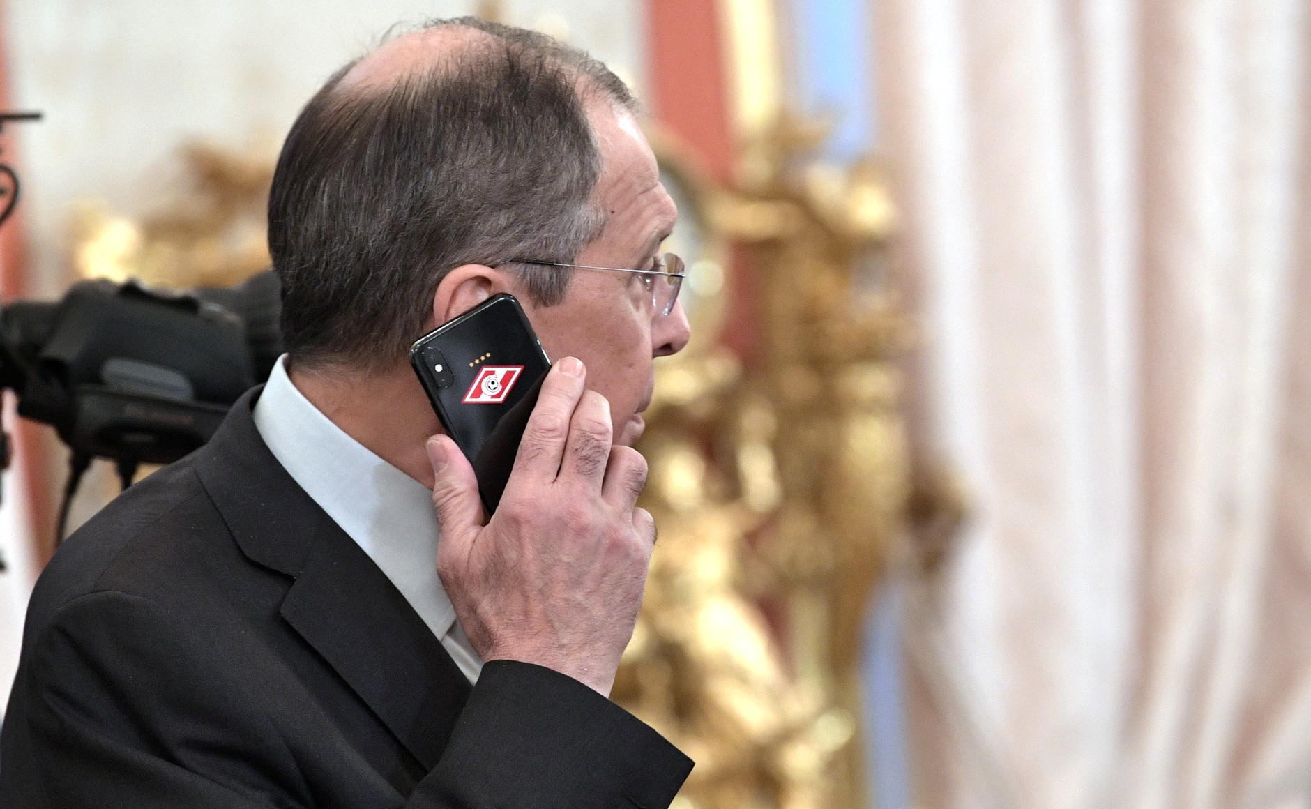 Министр иностранных дел Сергей Лавров перед началом заседания Совета сотрудничества высшего уровня между Российской Федерацией и Турецкой Республикой